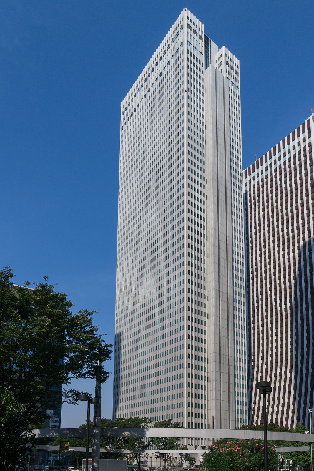 新宿野村ビル、東京都新宿区西新宿。